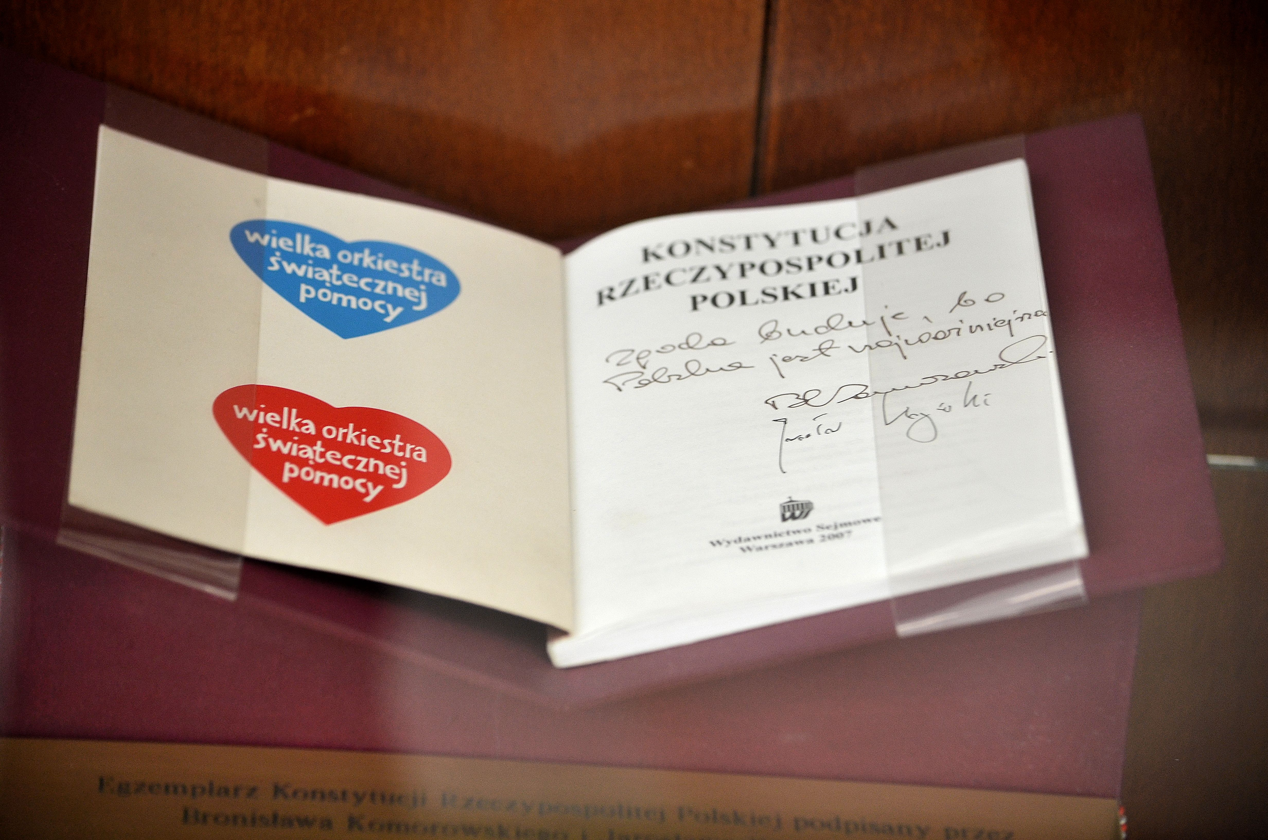 Gmach Sejmu. Opis za tabliczką informacyjną umieszczoną w gablocie: Egzemplarz Konstytucji Rzeczypospolitej Polskiej podpisany przez Bronisława Komorowskiego i Jarosława Kaczyńskiego, kandydatów na urząd Prezydenta RP, w dniu 2 lipca 2010 r. podczas telewizyjnej debaty prezydenckiej, i przekazany Wielkiej Orkiestrze Świątecznej Pomocy. Nabyty przez Kluczyk Holding S.A. na licytacji w dniu 15 lipca 2010 r. prowadzonej w ramach akcji "Stop powodziom". Zgodnie z wolą Wielkiej Orkiestry Świątecznej Pomocy, firmy Kulczyk Holding oraz słuchaczy Programu I Polskiego Radia został przekazany Marszałkowi Sejmu RP jako świadectwo demokratycznych przemian, które zaszły w Polsce w ciągu 20 lat niepodległości